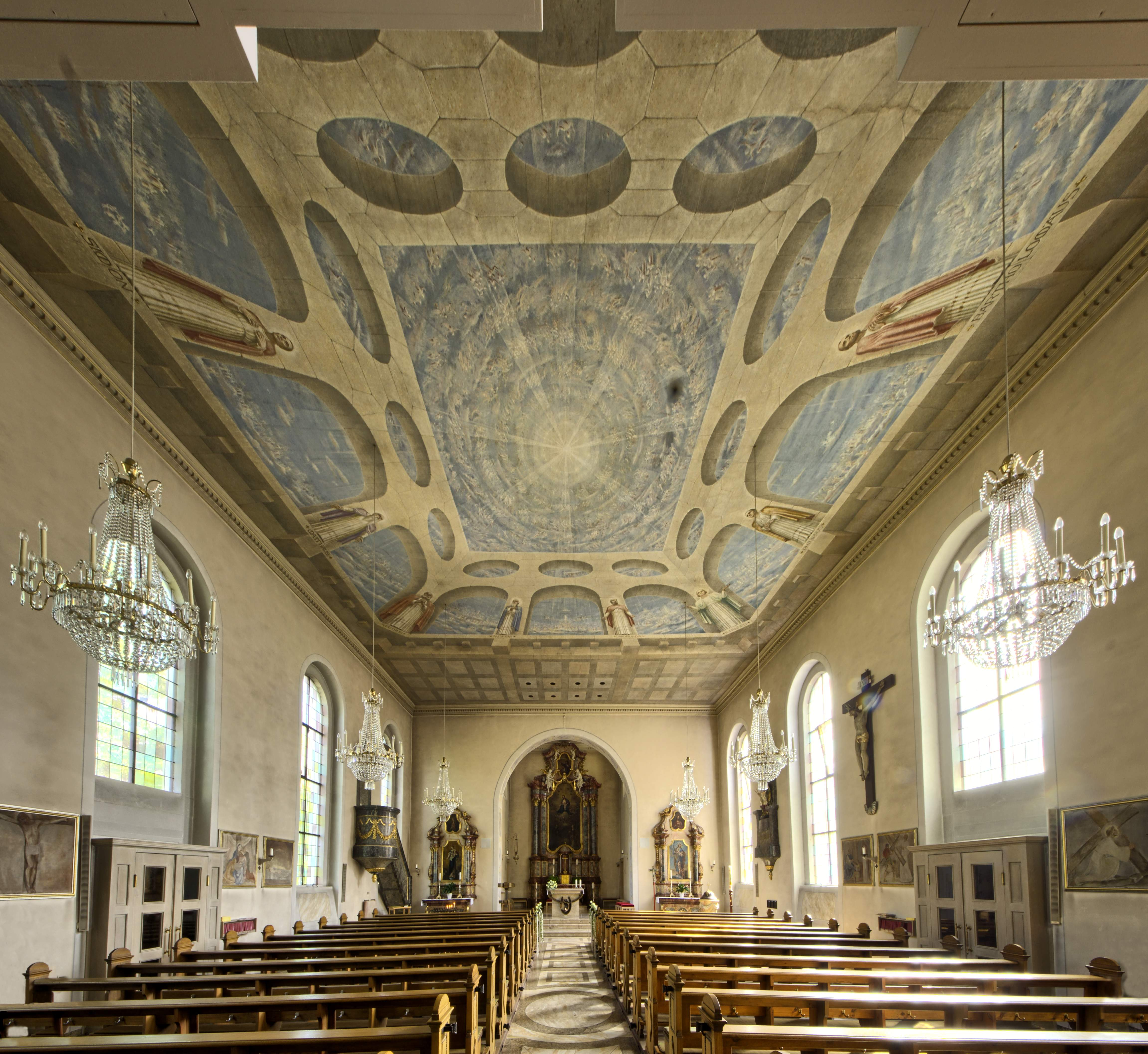 St Blasius in Freiburg Zähringen Blick von der Orgel zum Altar (Schwerpunkt Decke)